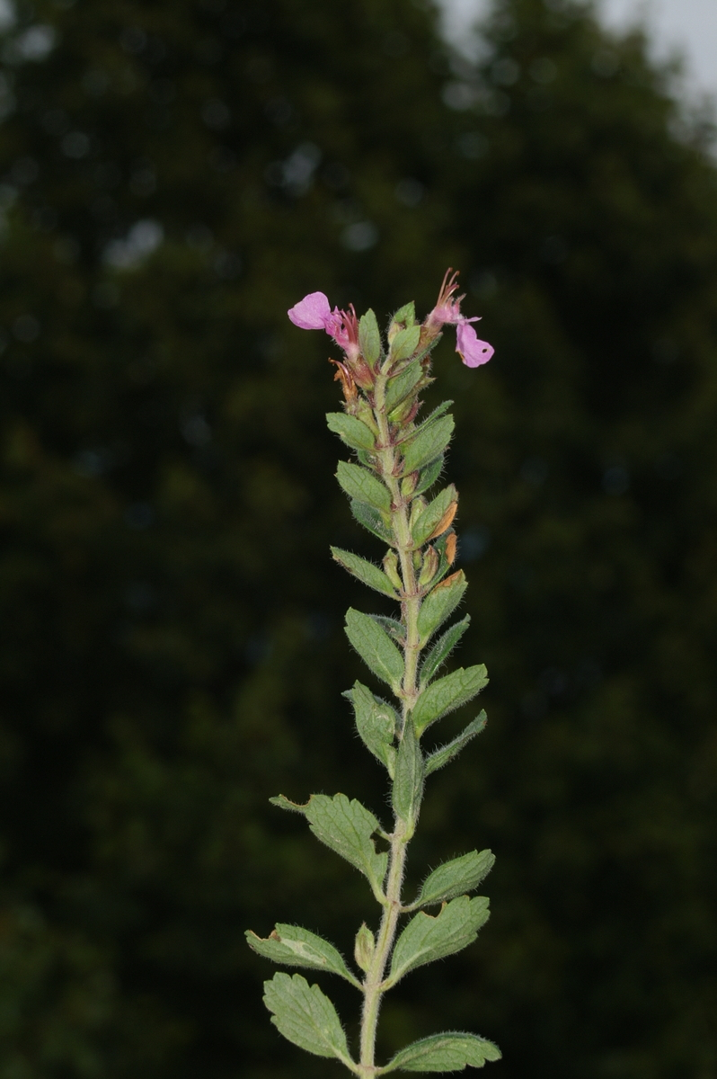 Navadni vrednik na Katarini nad Ljubljano.